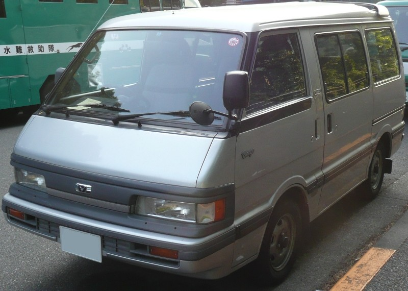 ボンゴワゴン。本人撮影。 Category:乗用車画像